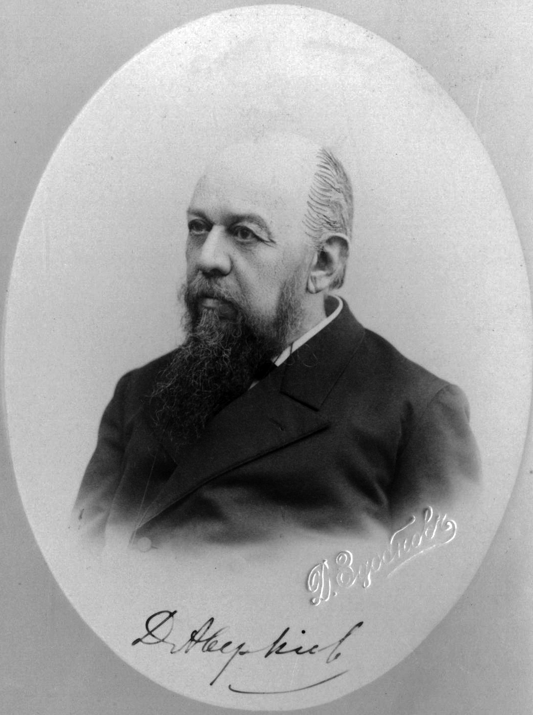 Аверкиев Дмитрий Васильевич, 1890-е годы